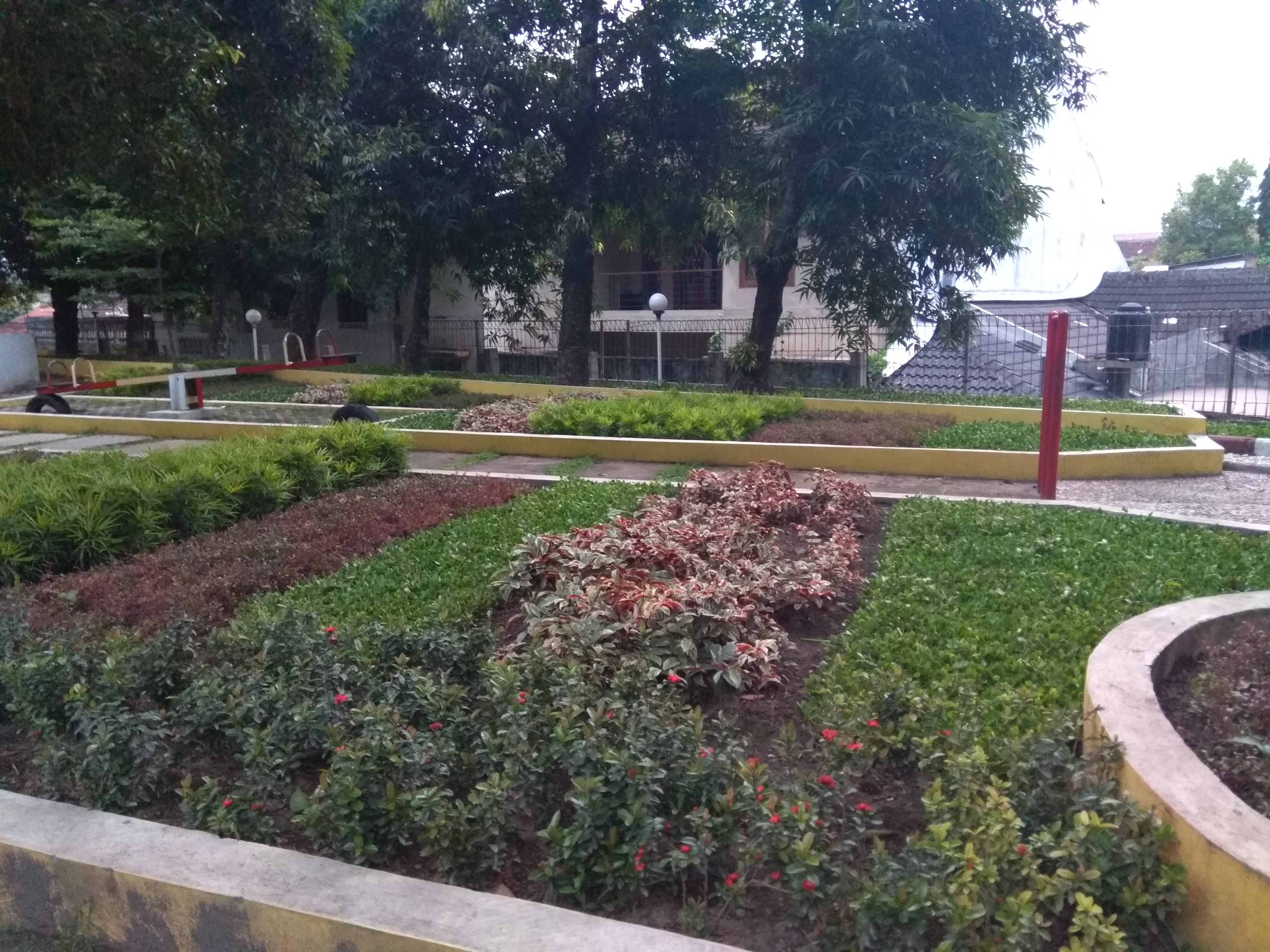 Tanaman Penghijau Taman Karang